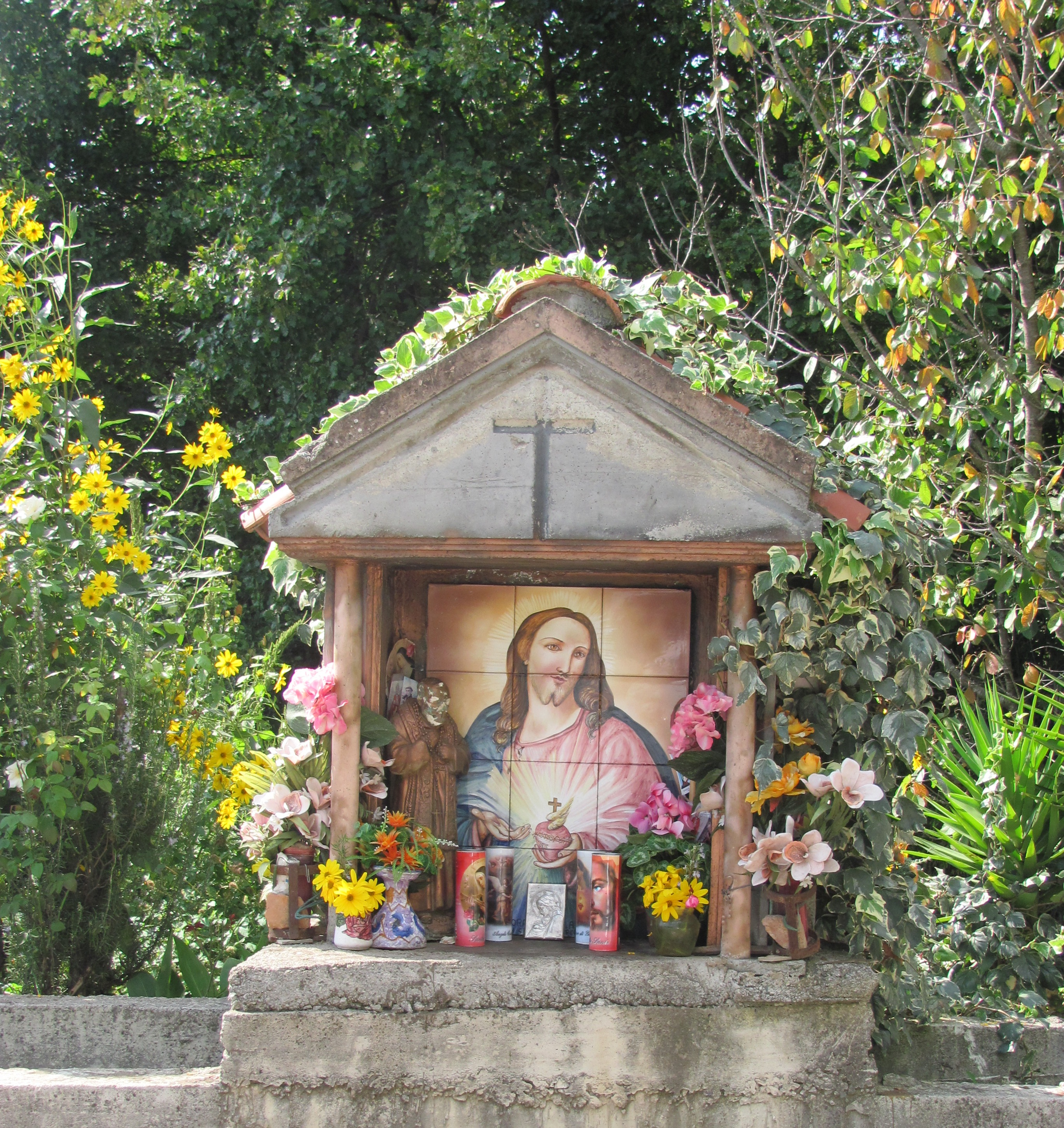 Edicola votiva, strada nuova, monte Le Porche, SIANO (SALERNO)